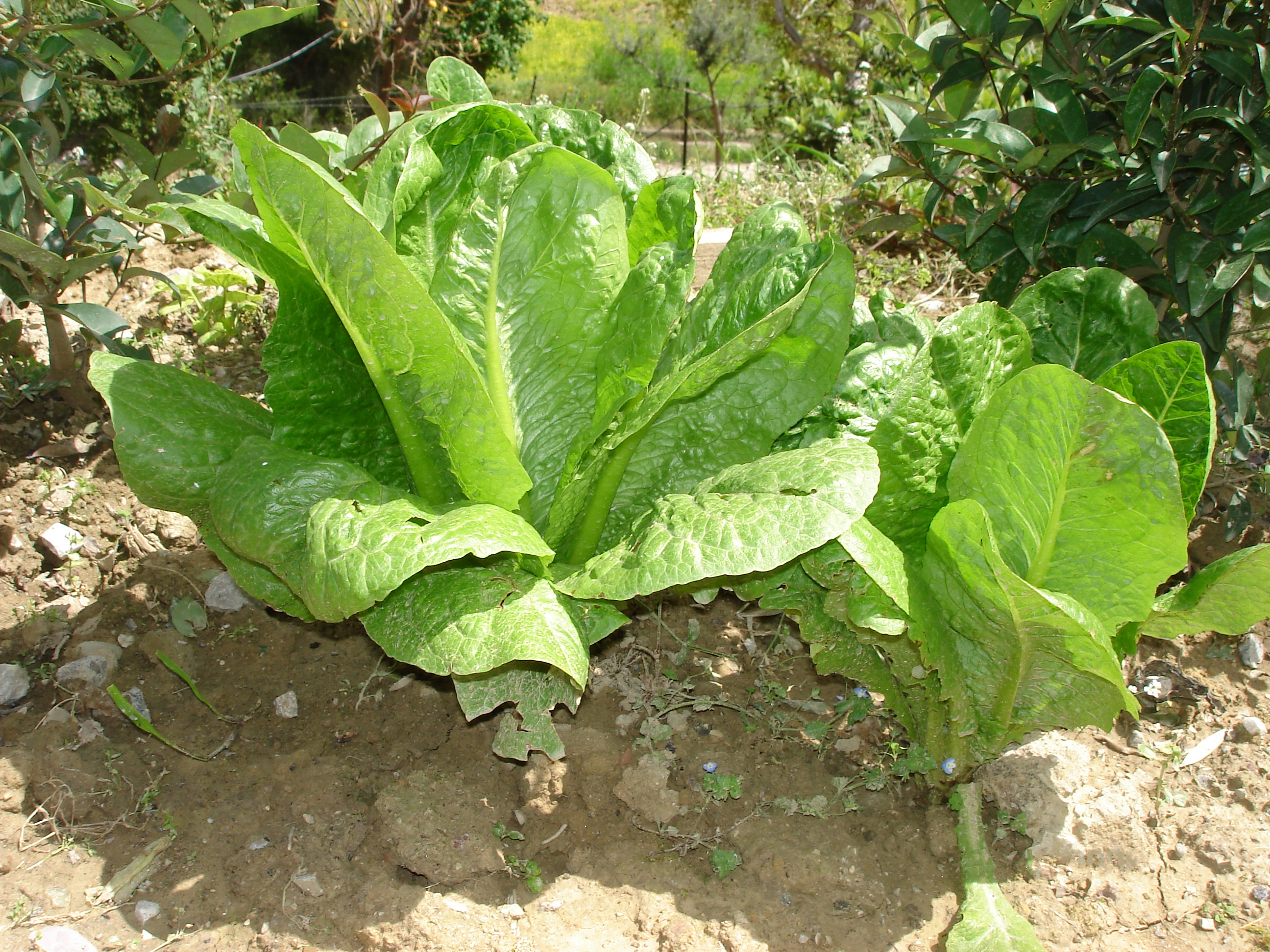 Μαρούλια